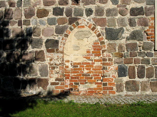 Zugemauerter Südeingang der Kirche in Stolpe-Dorf (Stadt Hohen Neuendorf, Landkreis Oberhavel, Brandenburg).